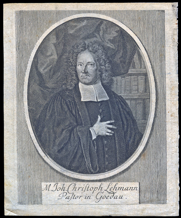 1 grafiskt blad, kopparstick Kopparstick föreställande Johann Georg Christian Lehmann (1792-1860), botanist.